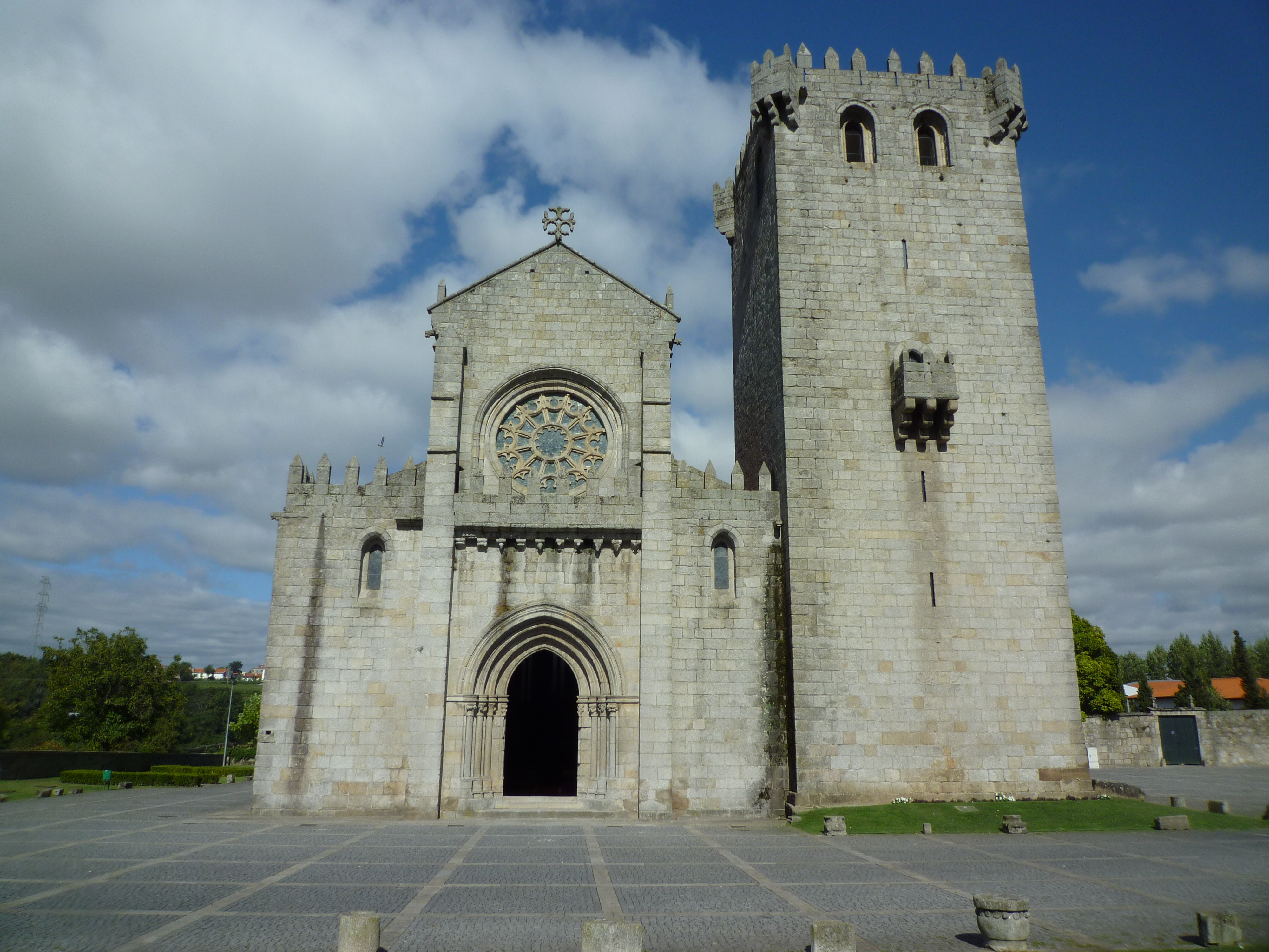 Mosteiro de Leça do Balio